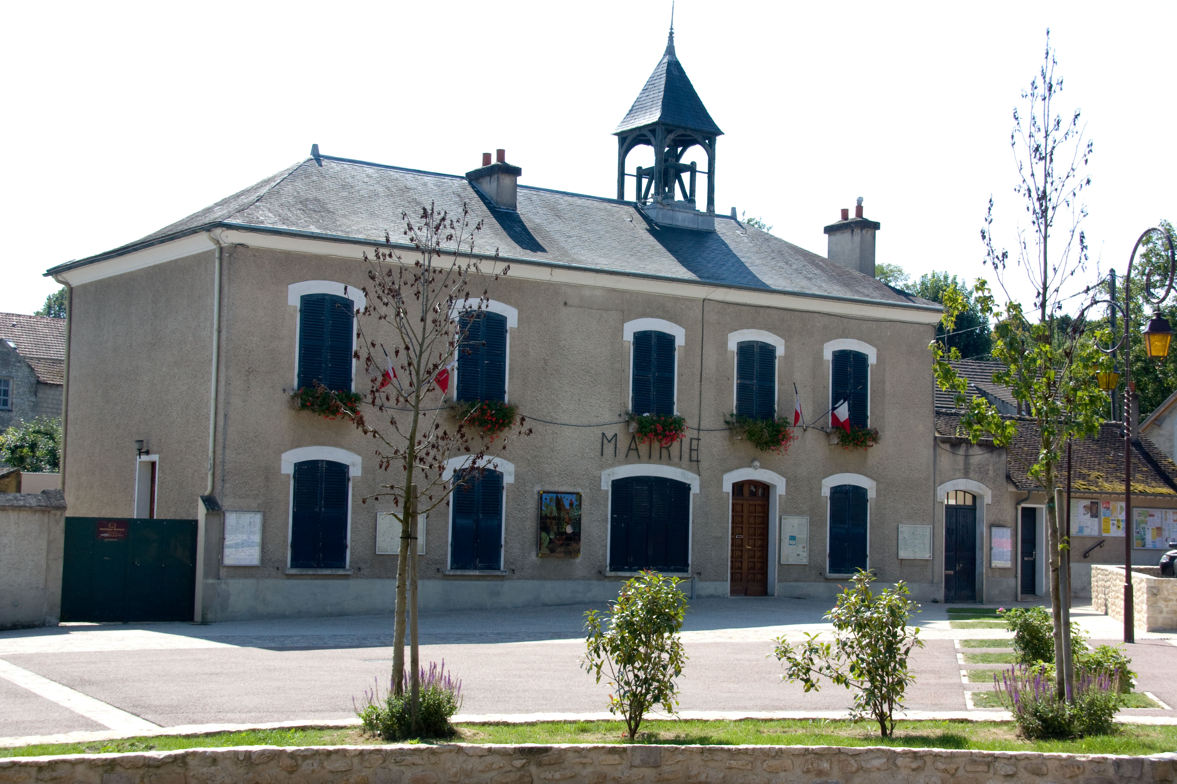 Mairie de Montigny-sur-Loing (Montigny-sur-Loing, Seine-et-Marne, France)